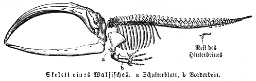 Abbildung aus Meyers Konversionlexikon 1888 - Skelett eines Walfisches